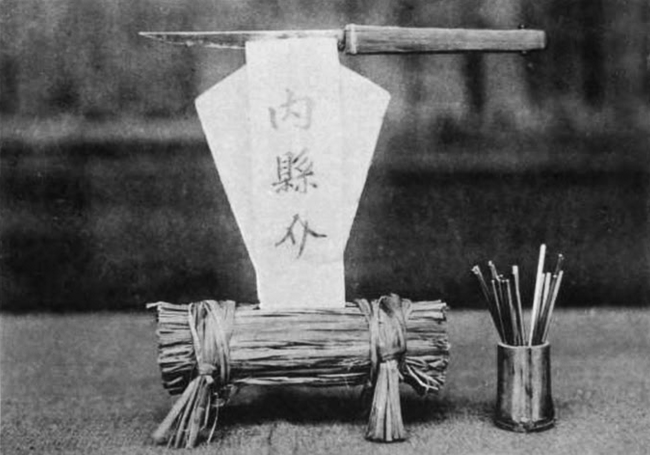 諏訪大社の御頭御占神事に使用される剣先版。